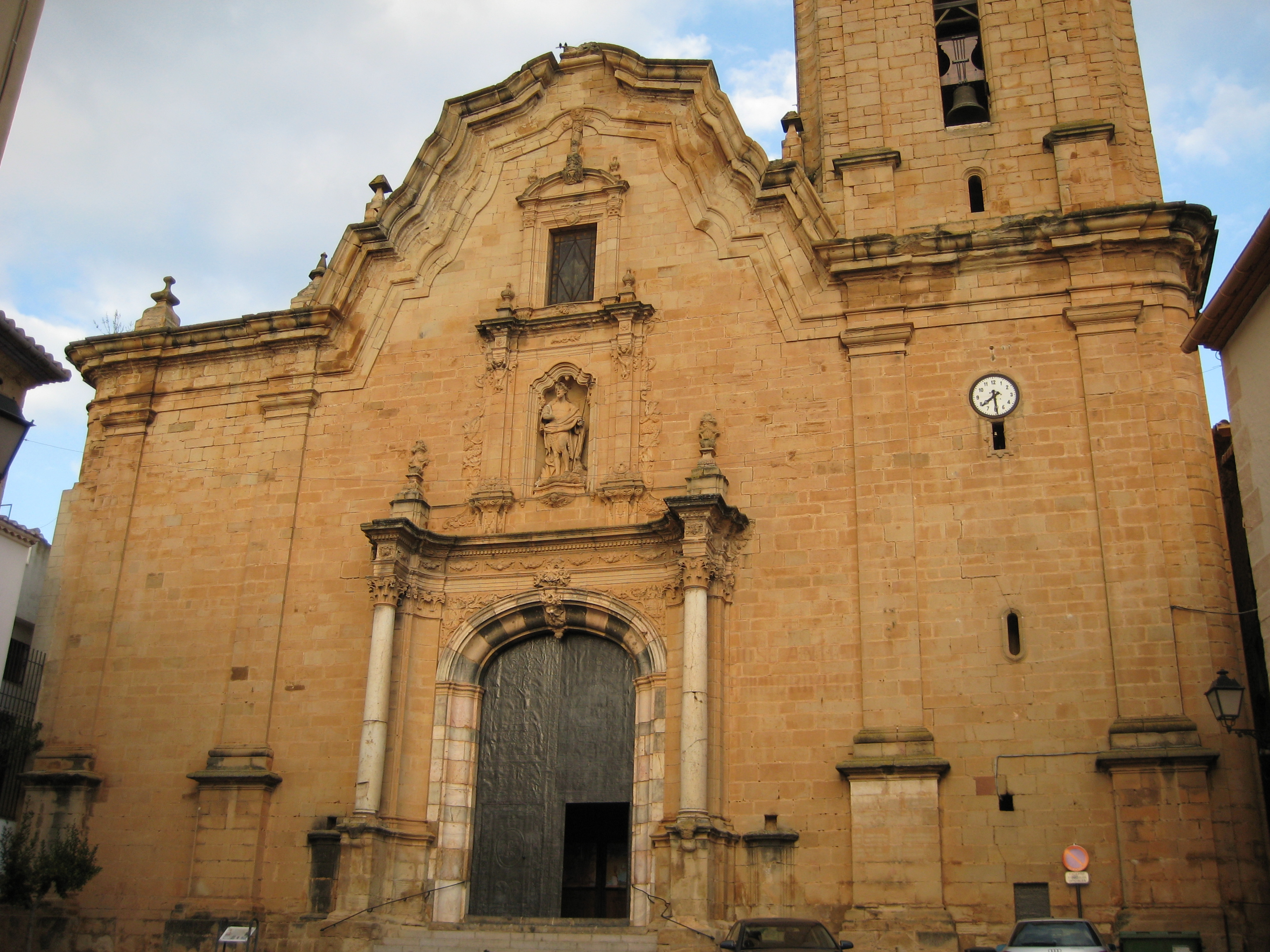 Façana de l'església de Sant Joan Baptista de Cabanes (Plana Alta)